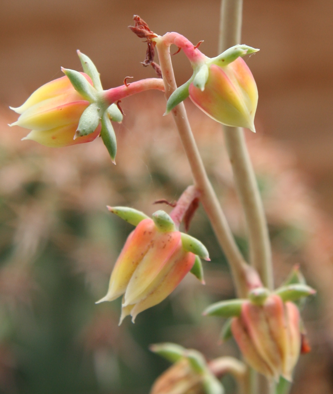 Echeveria nodulosa, Ausschnitt aus einem Blütenstand